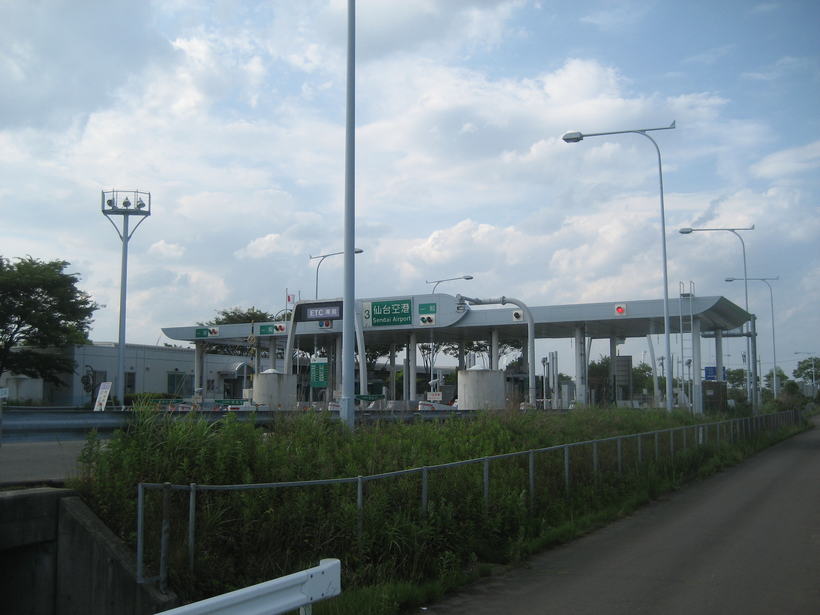 仙台東部道路仙台空港IC料金所（一般道路から撮影）